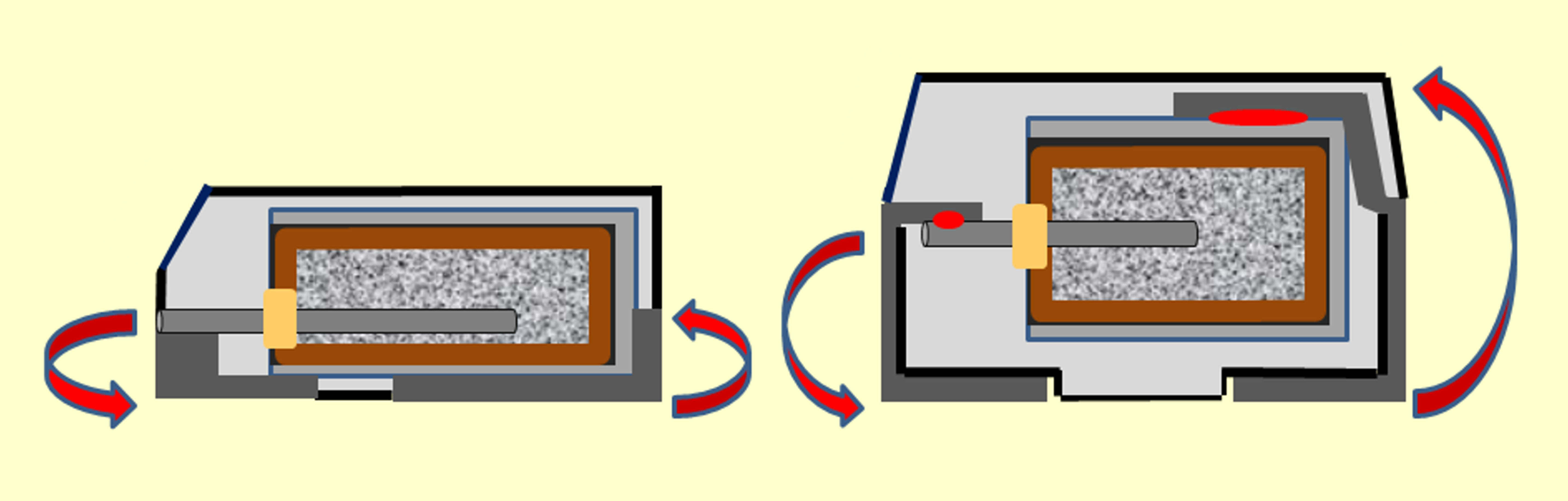 Durch eine "face-down"-Konstruktion verringert sich die Induktivität eines Tantal-Chip-Kondensators